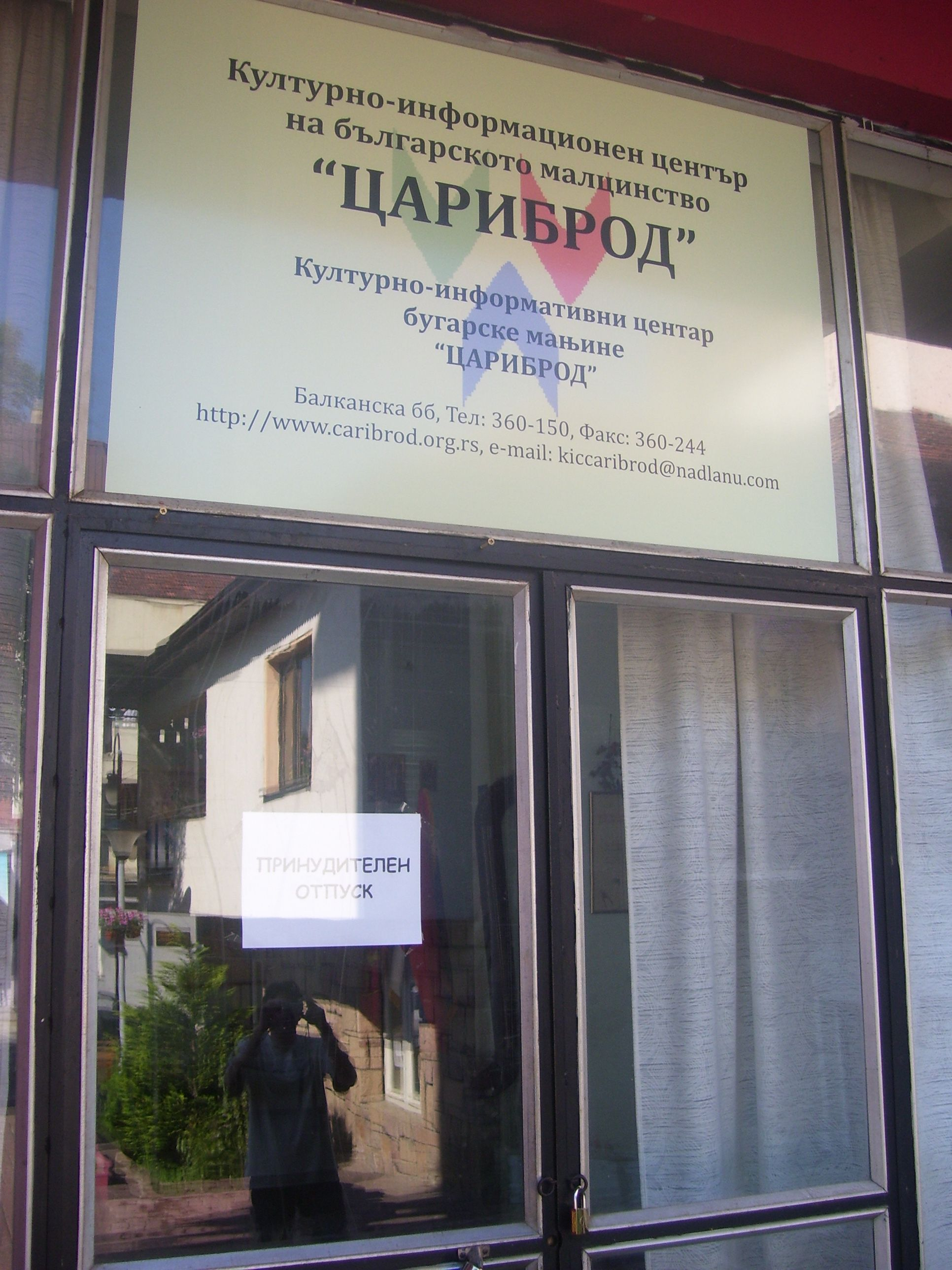 Сградата на Културно-информационния център на българското малцинство в Сърбия Цариброд